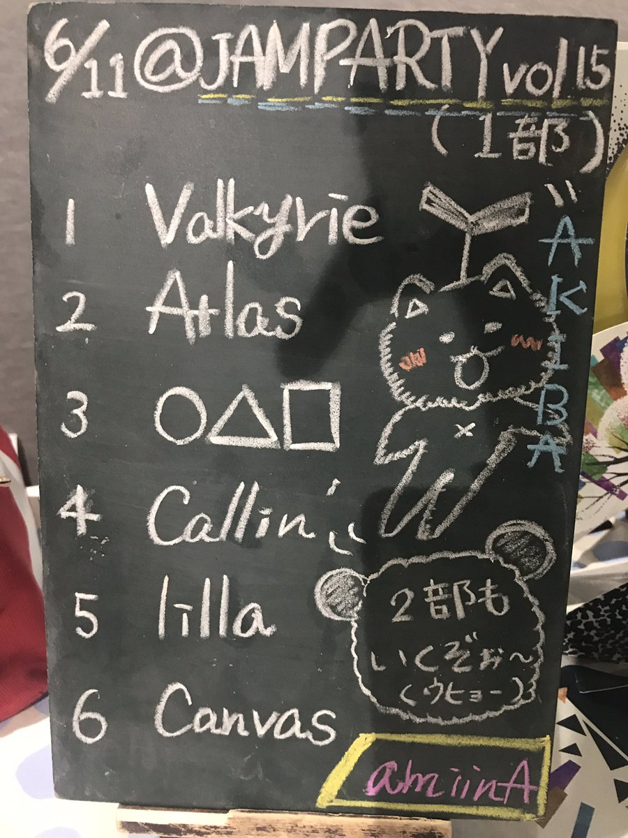 amiinAセトリボード(20170611(1))